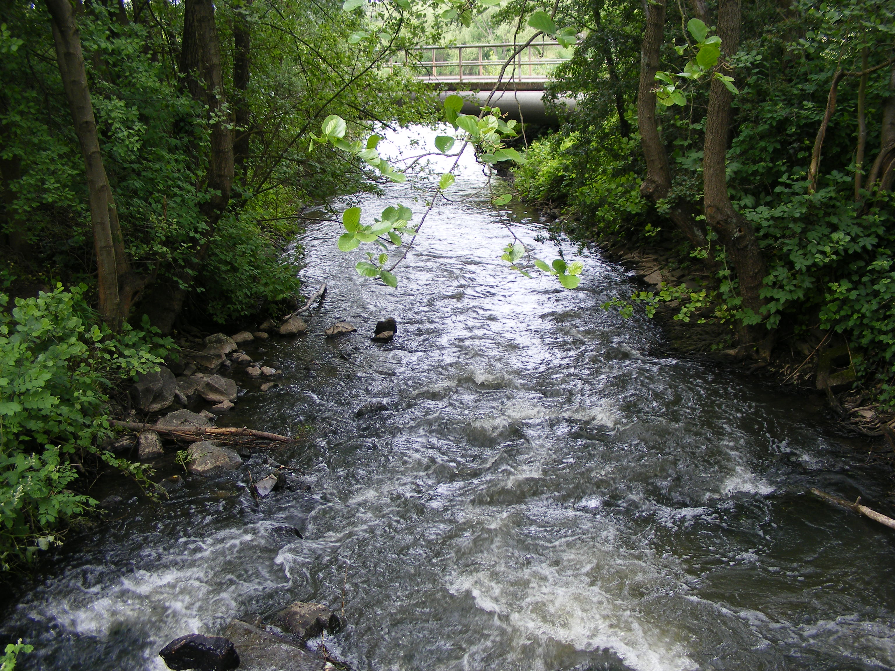 Bist bei Wadgassen; Erlaubnis zur Nutzung von Dr. Andreas Neumann vorliegend